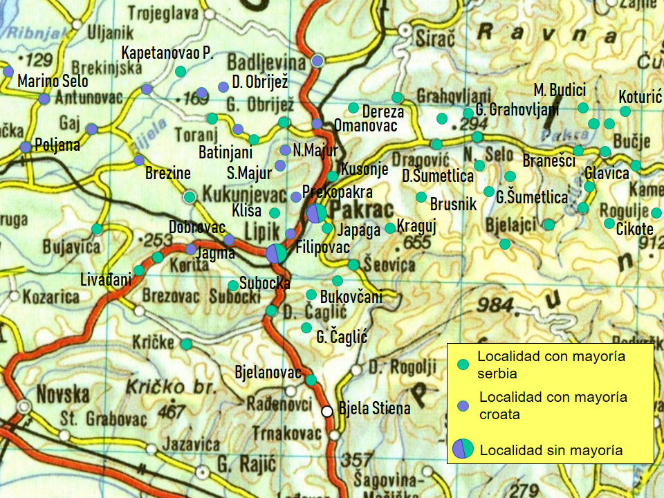 Composición étnica del municipio de Pakrac en el año 1991 según localidades. Confeccionado sobre la base de composition of Croatia 1991 Fecha de acceso =4 de marzo de 2019 Autor=Bespyatov, Tim Año=2017